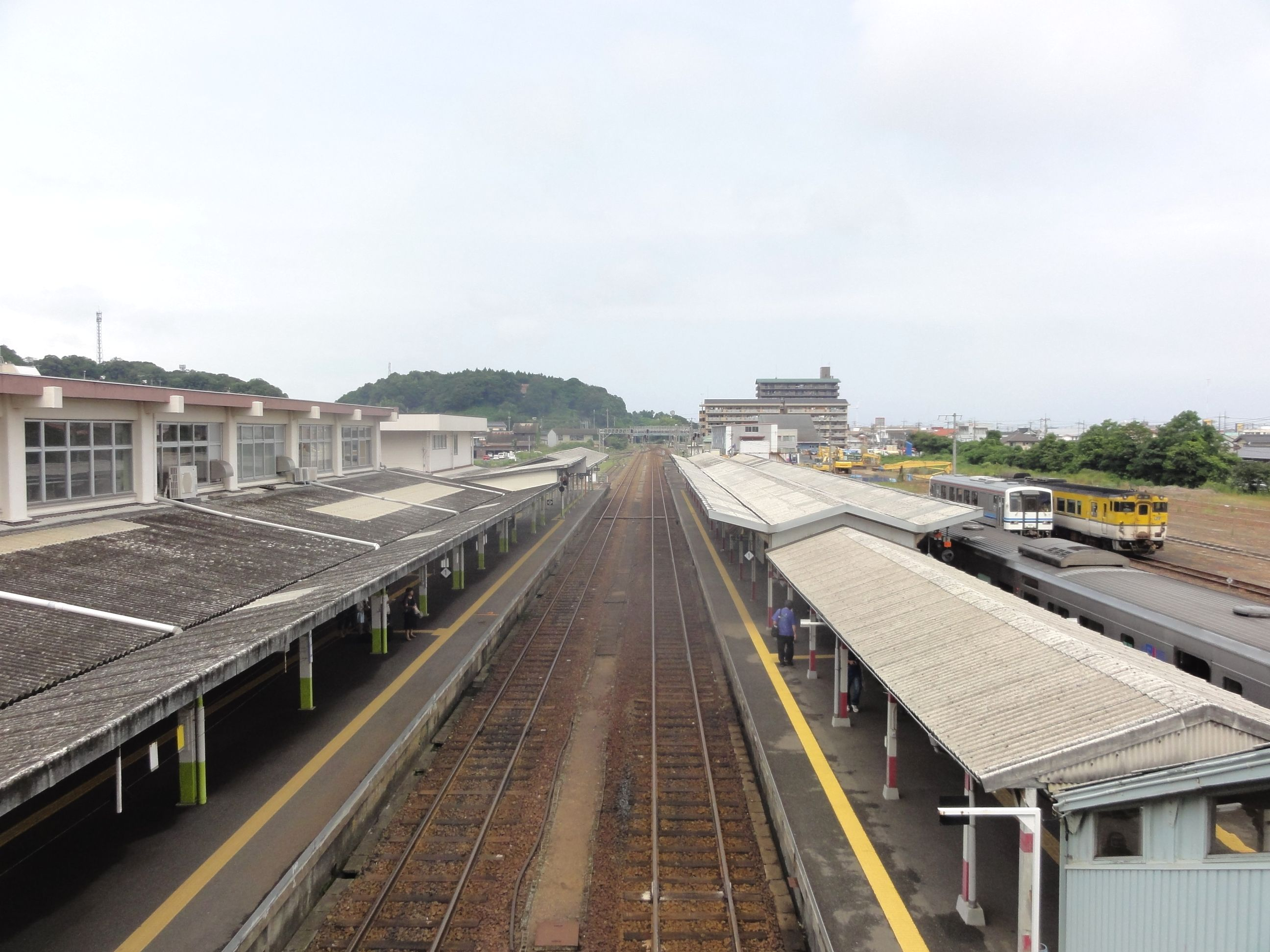 益田駅ホーム